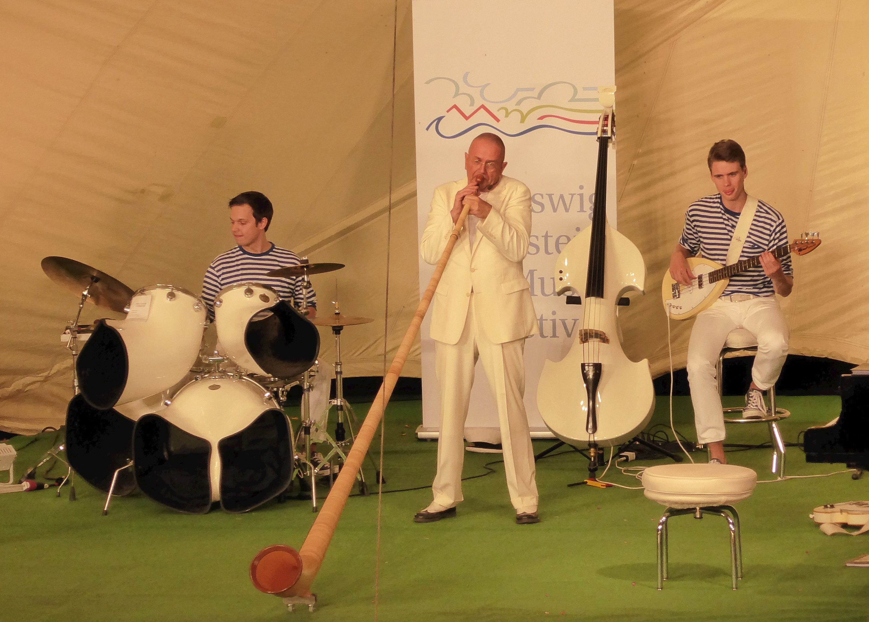 Hans Liberg in Eutin